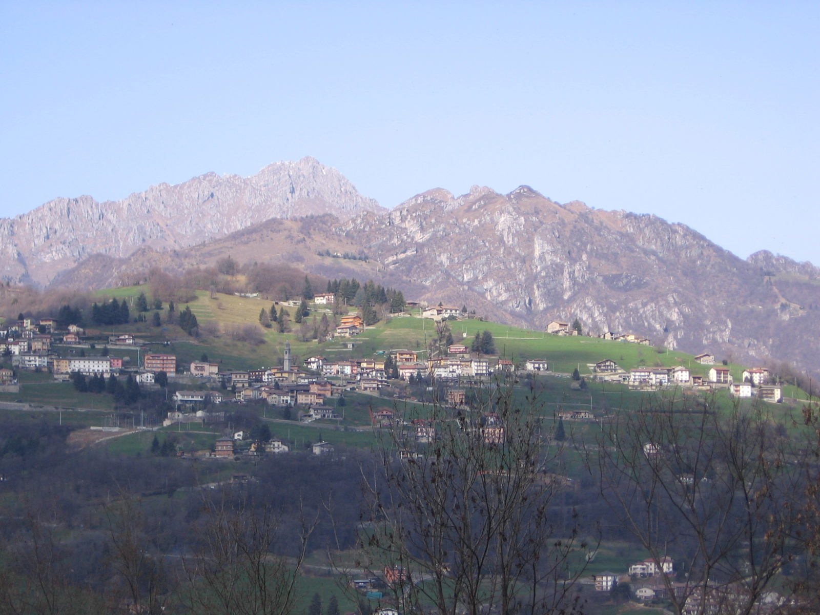 Vista di Orezzo, frazione di Gazzaniga (BG), con il monte Alben sullo sfondo